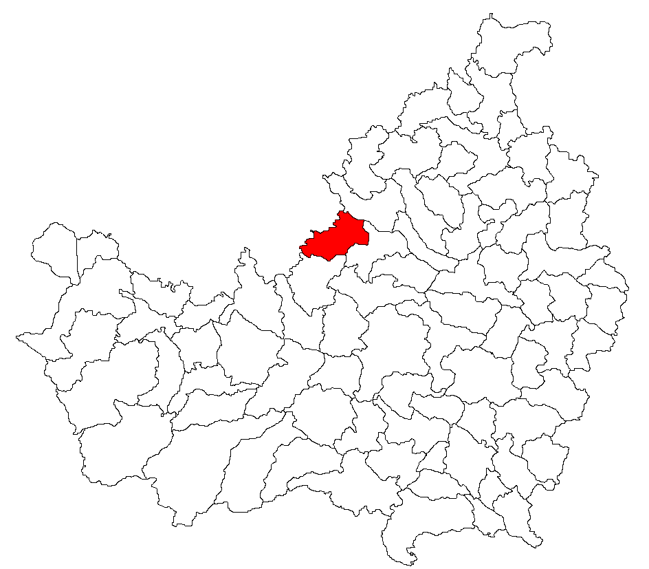 Comuna Aschileu, judeţul Cluj